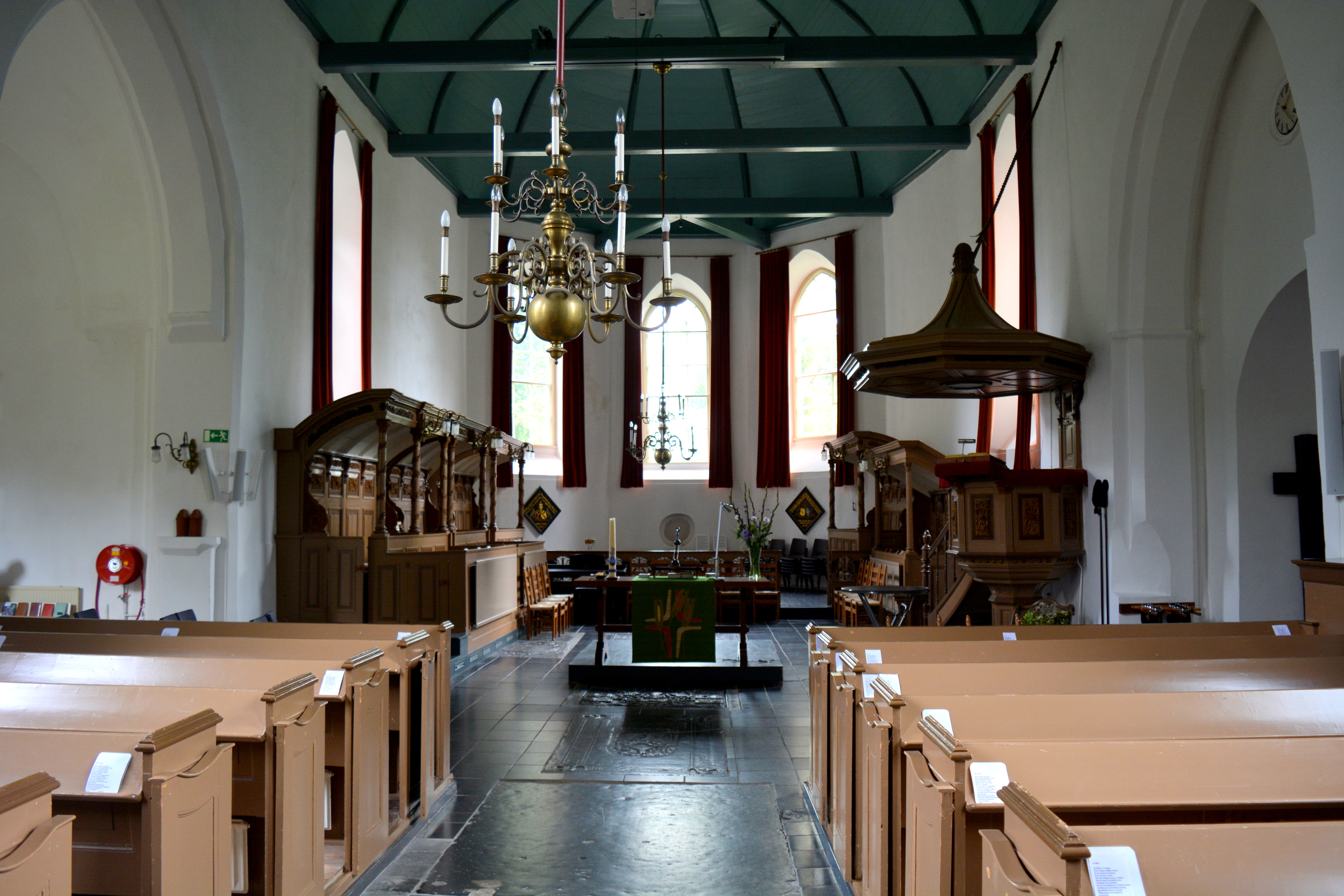 Wirdum, Martinuskerk, overzicht interieur